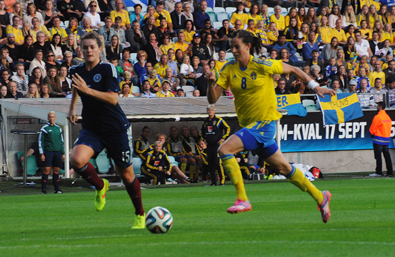 a_25_1678